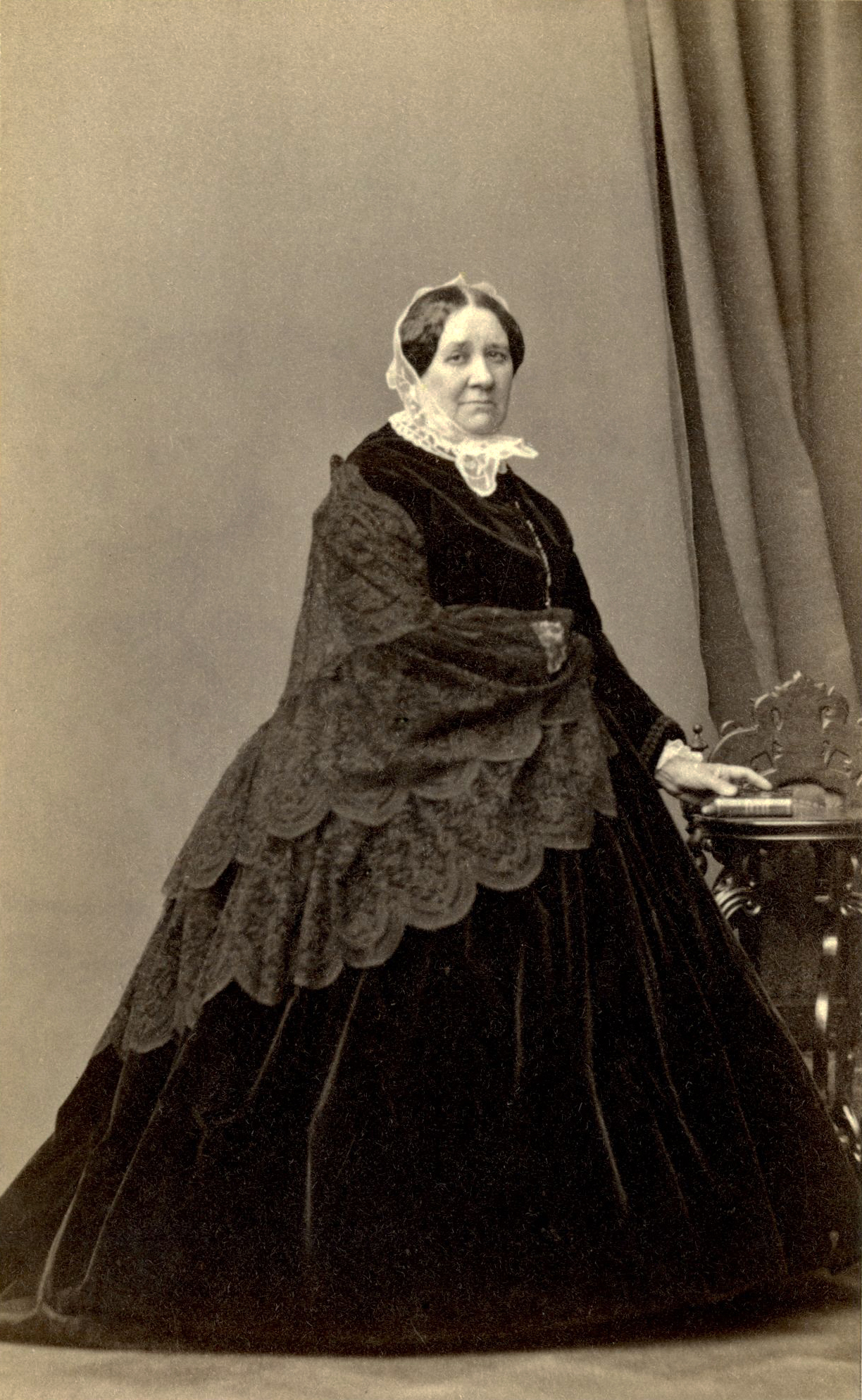 Актриса А.М.Каратыгина